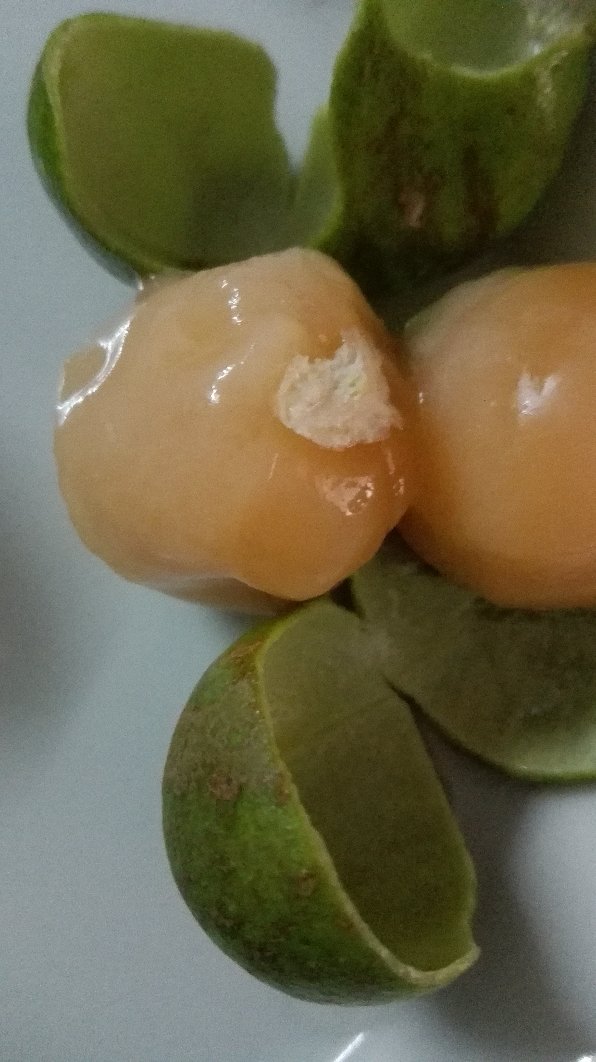 Huaya, fruta de le región.